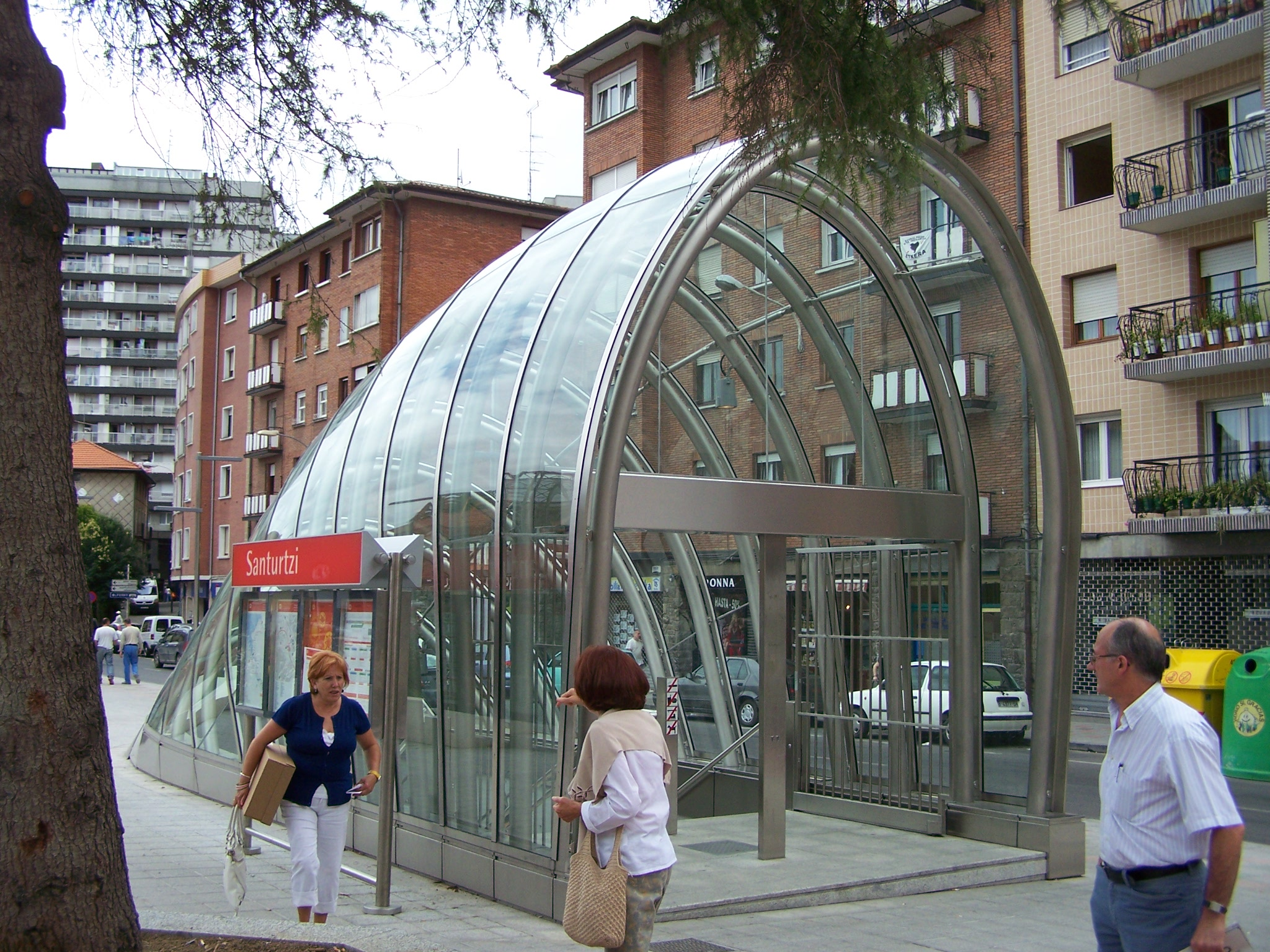 Einer der bekannten "Fosteritos" (weil von Sir N. Foster entworfen) am U-Bahnhof Santurtzi